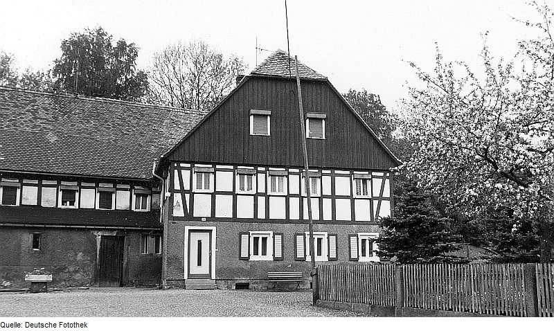 Original image description from the Deutsche Fotothek Berthelsdorf. Niedermühle, ehem. Sägewerk Bittrich